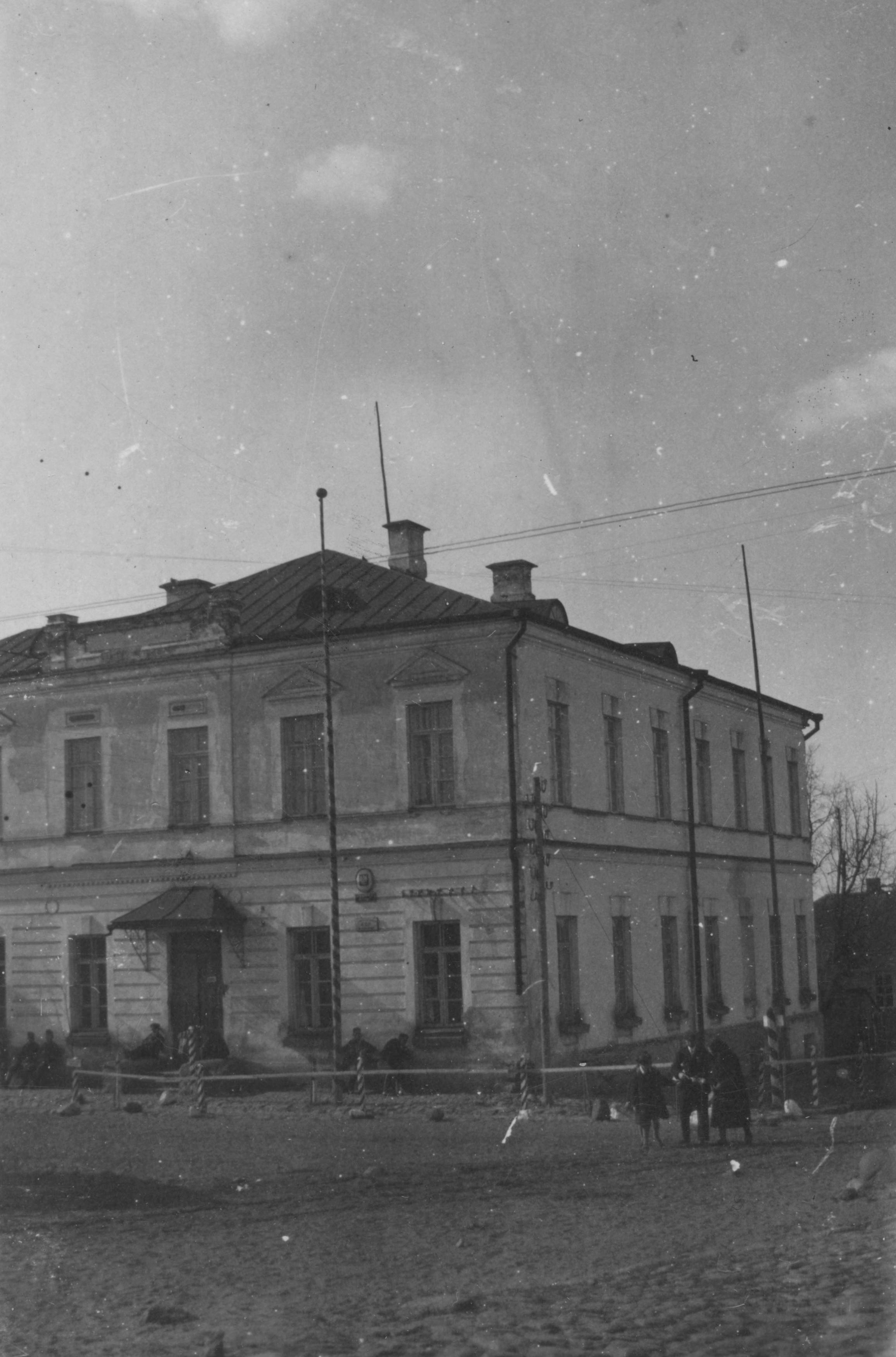 Беларуская (тарашкевіца): Дзісна (Dzisna), вуліца Касьцельная (vulica Kaścielnaja). Белы Дом (Bieły Dom)